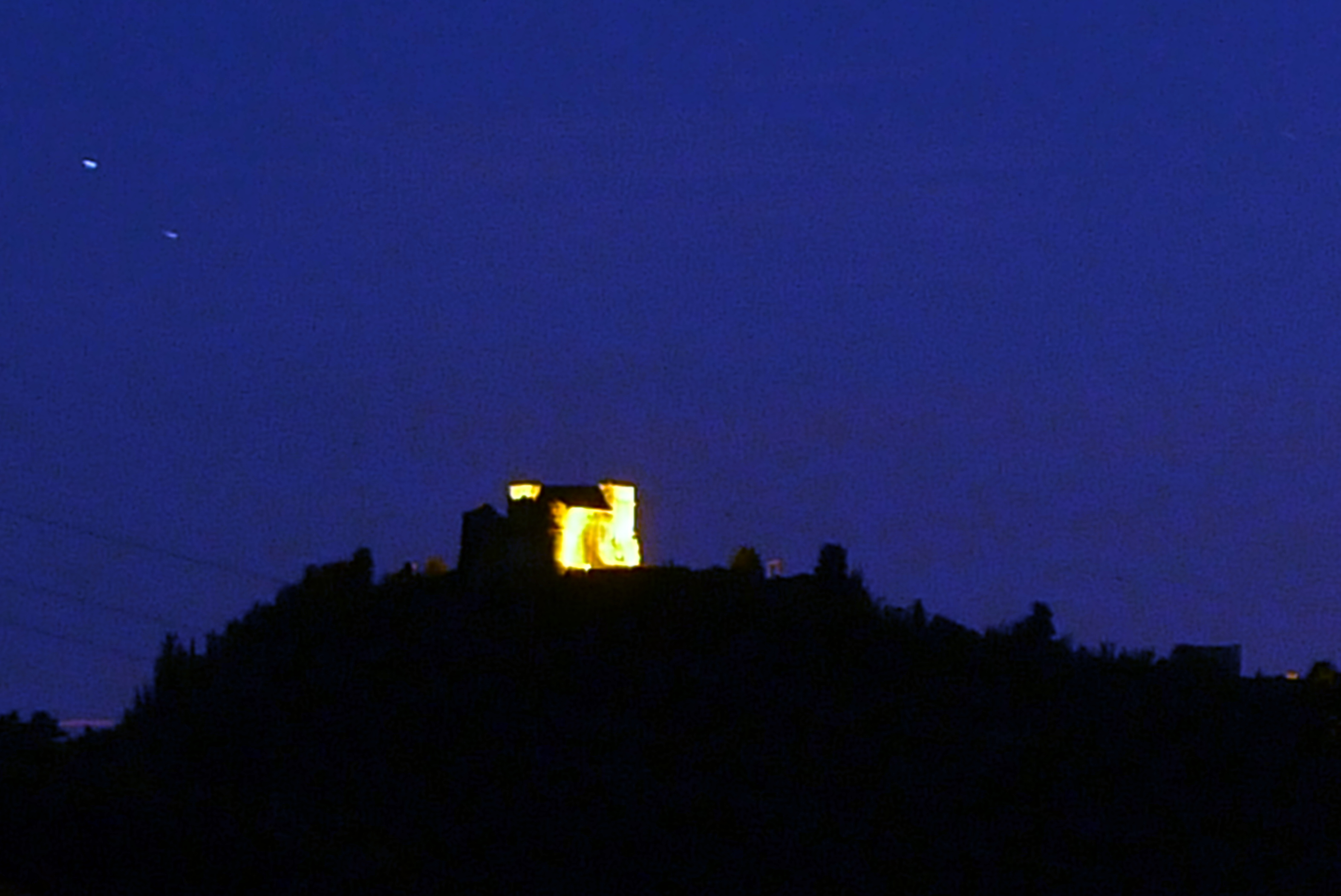 Castello Aghinolfi visto dal lato monte in tarda nottata